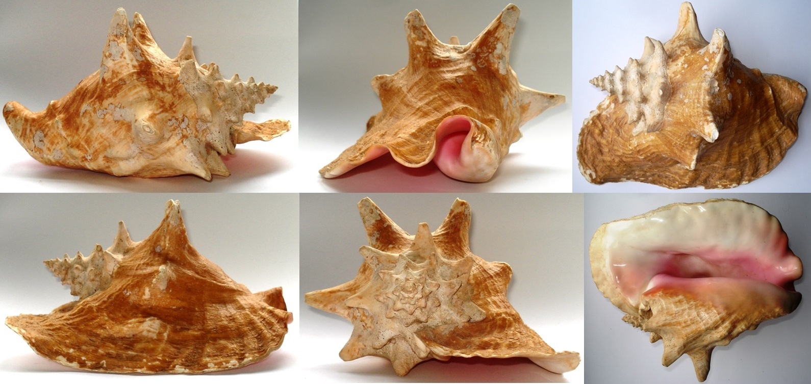 Lobatus gigas - Shell